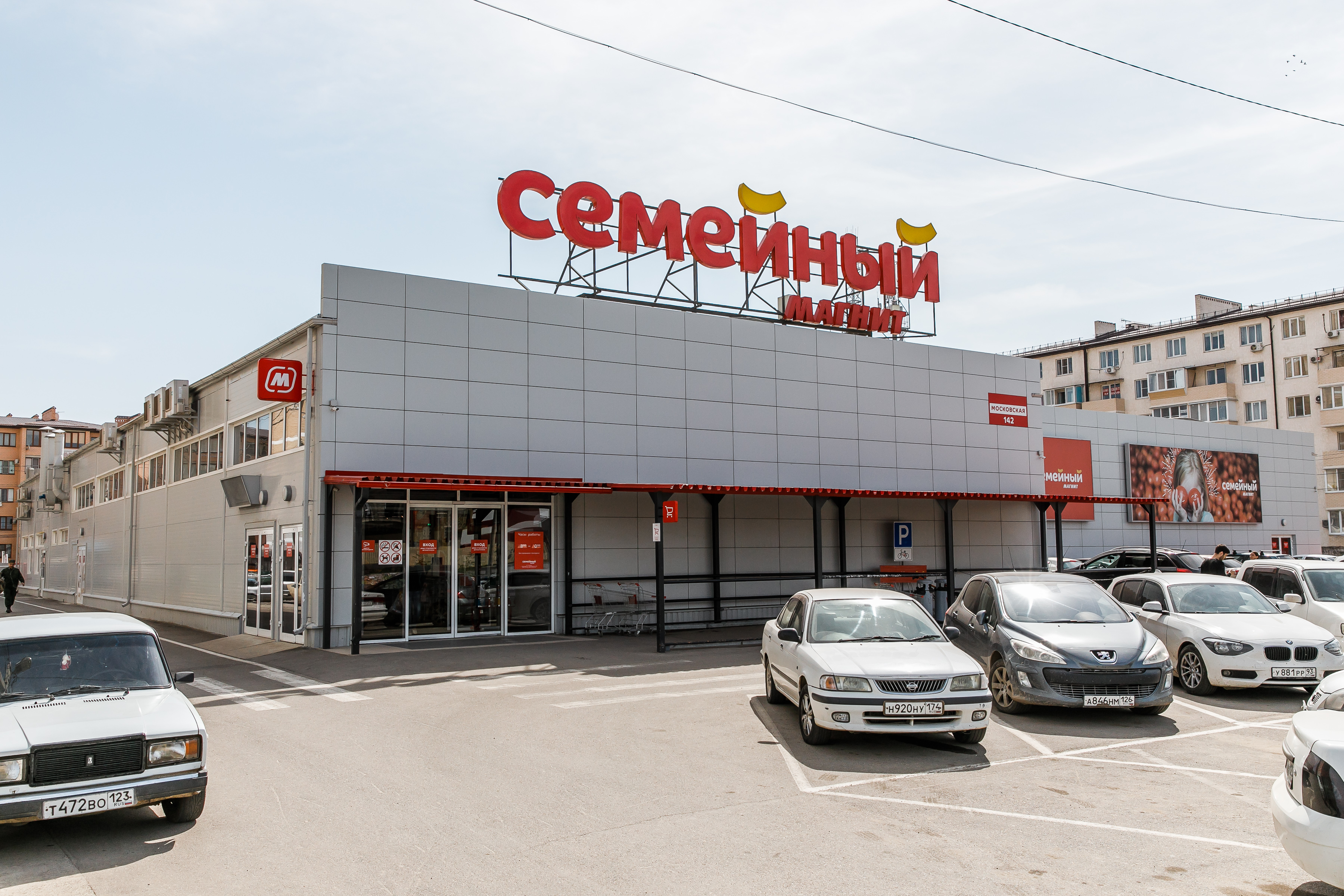 Магазин Магнит формата "Семейный" (Краснодар, Московская 142)